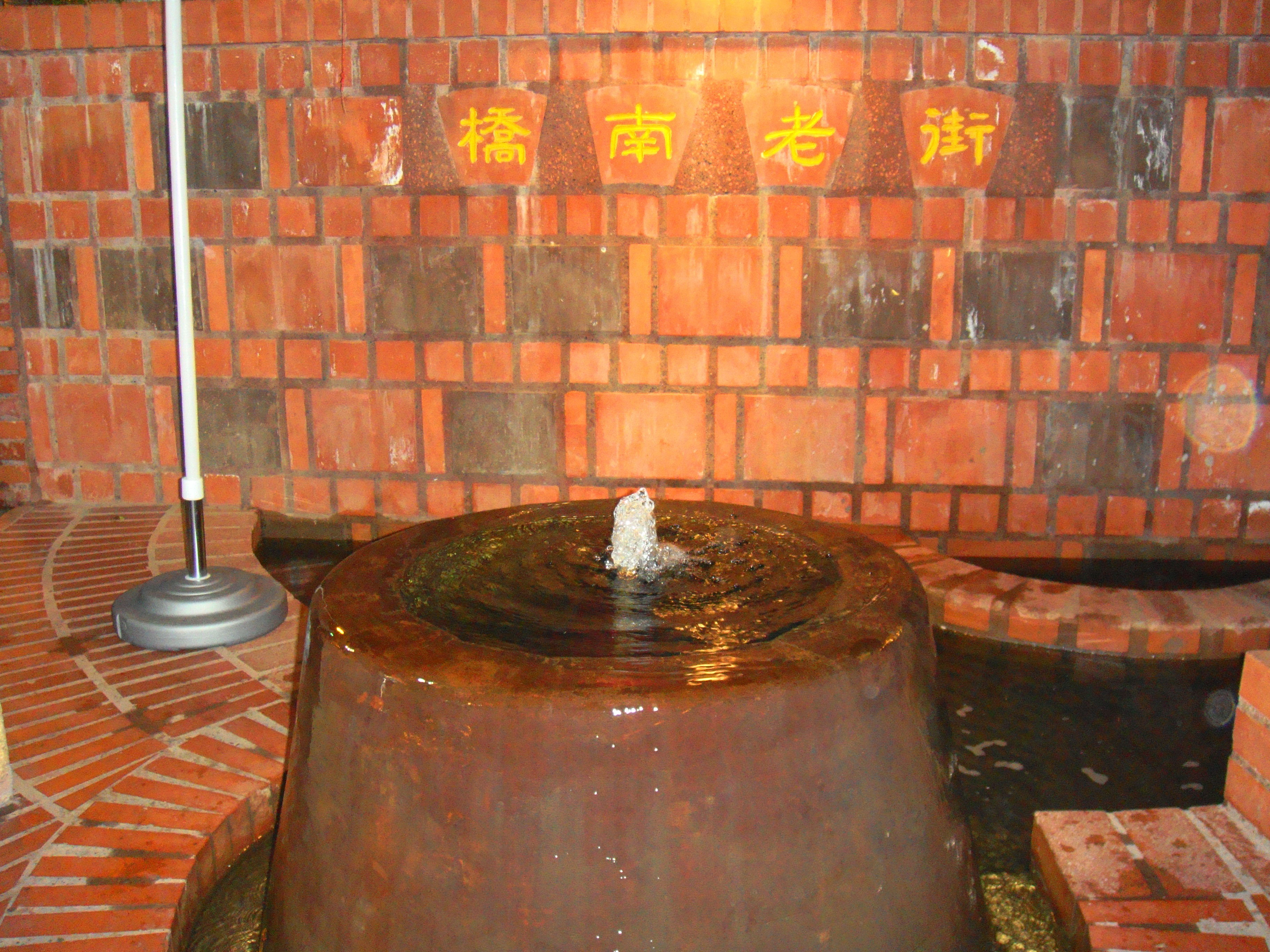 中文（台灣）: 橋南老街噴水池